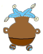 Glifo Náhuatl del municipio de Atotonilco de Tula, Hidalgo